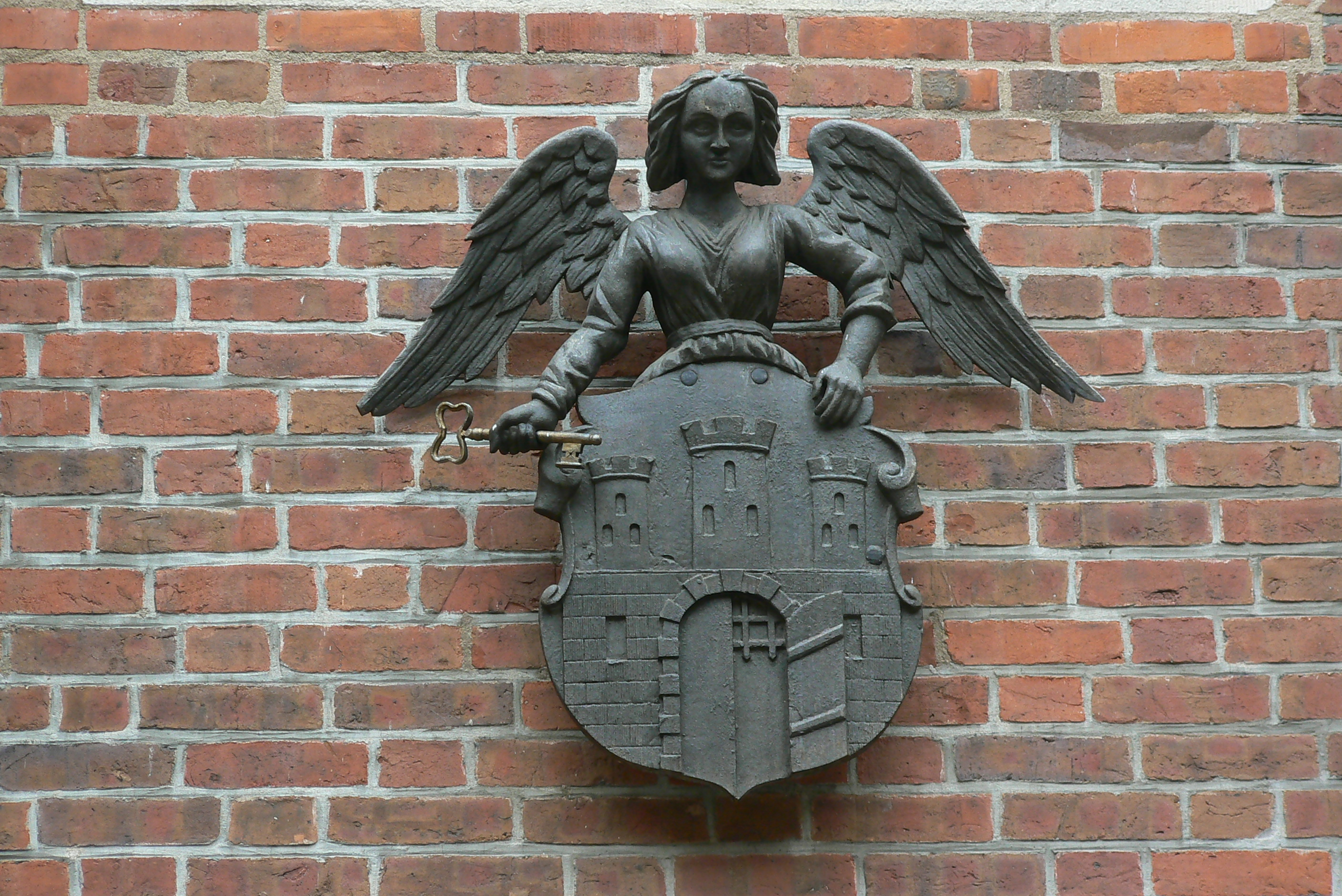 Toruń, mury obronne przedzamcza, XIII, XVII, XIX